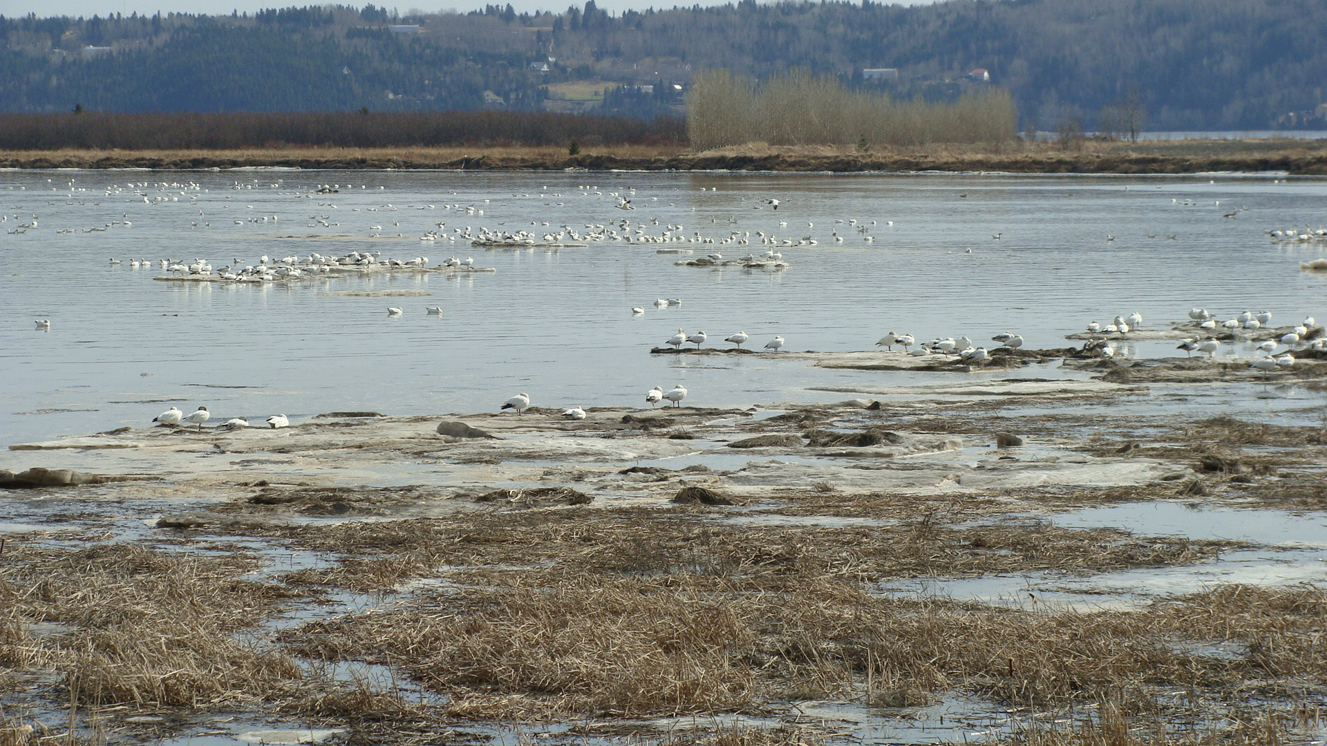 Oiseaux dans les battures de Saint-Fulgence, au Québec (Canada)